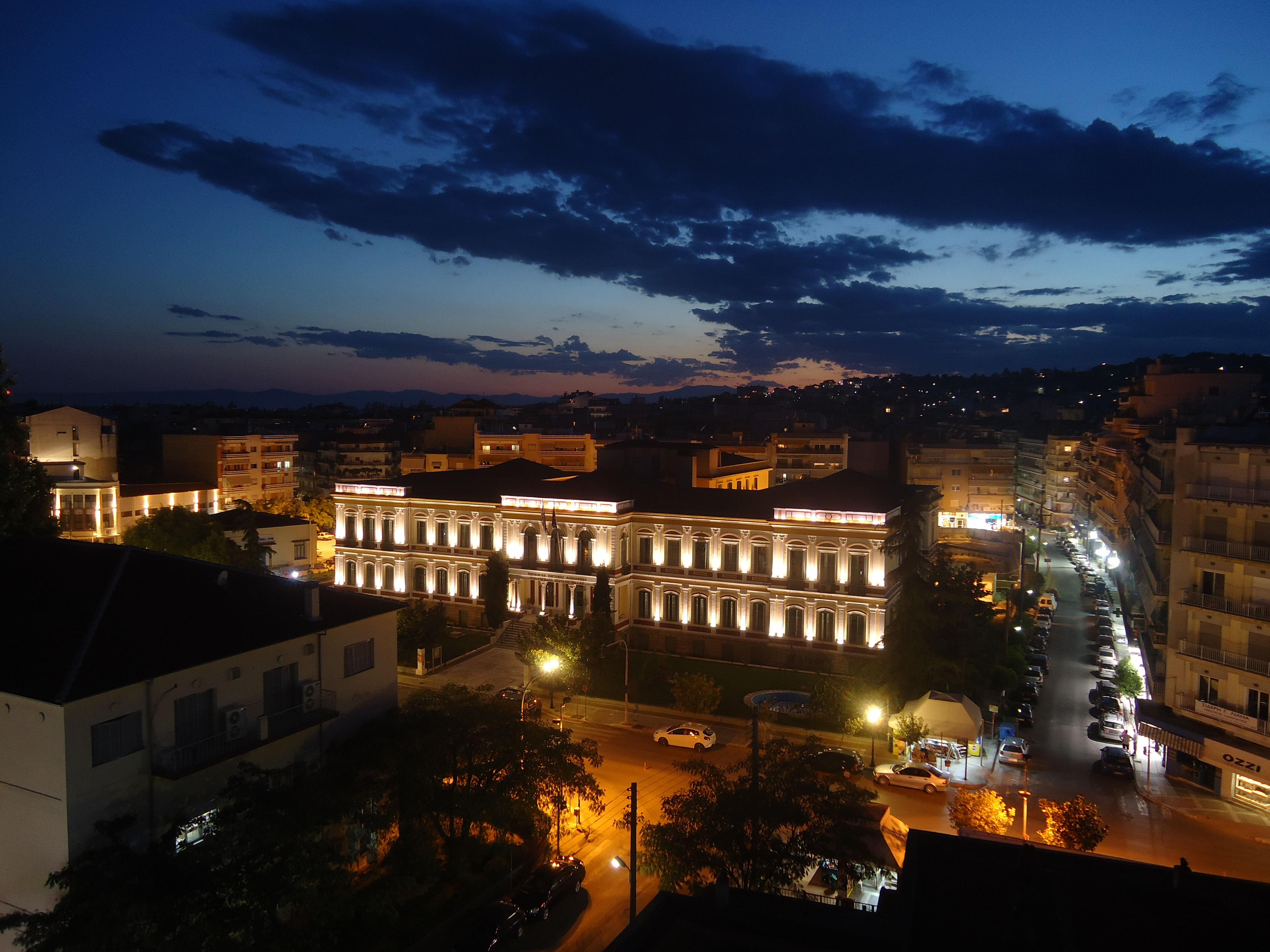 Σέρρες, το Διοικητήριο.